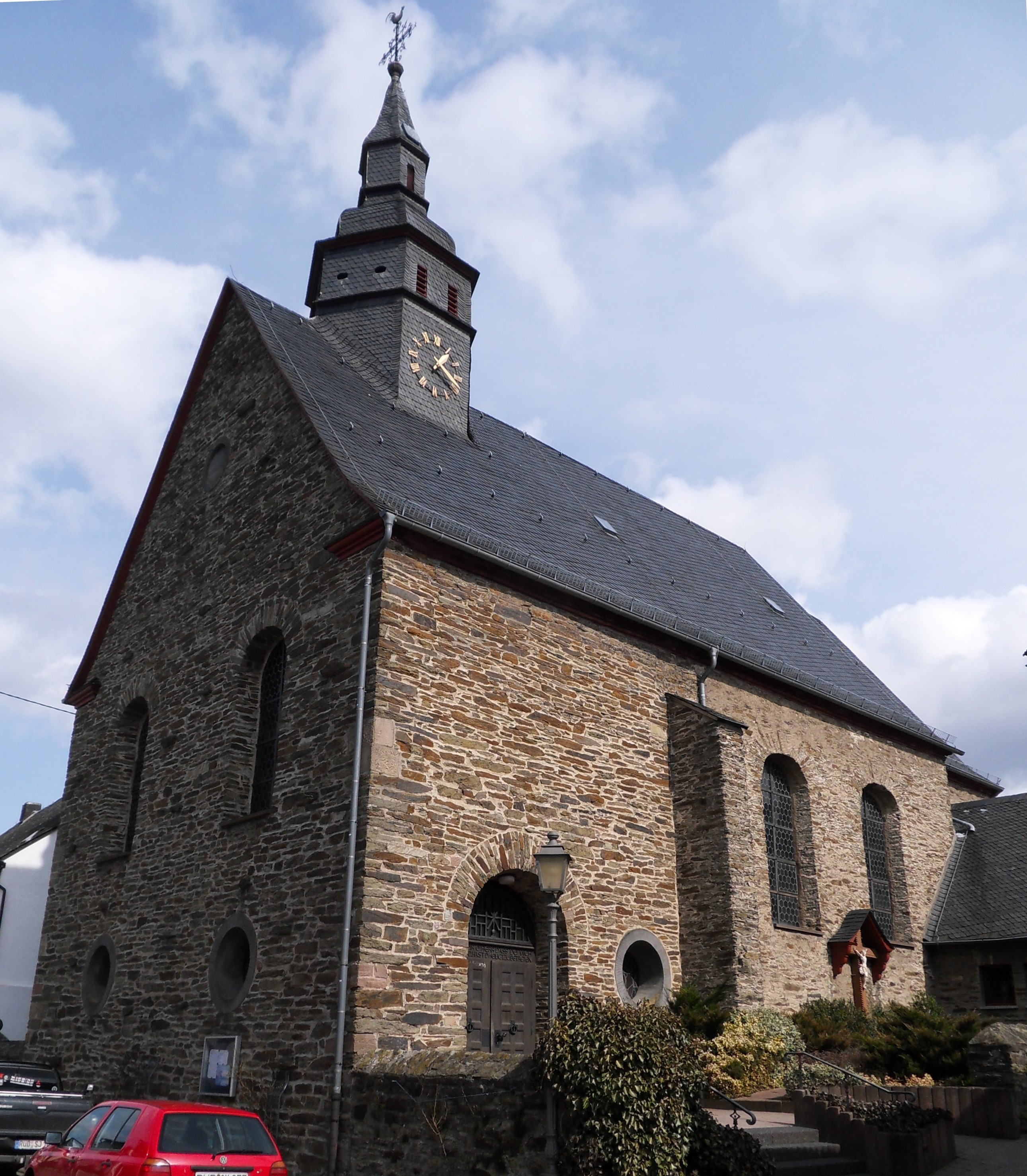 Blick von Südwesten auf die Pfarrkirche St. Laurentius in Presberg